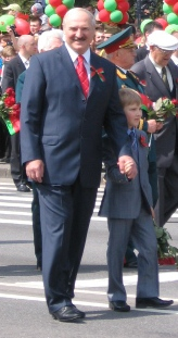 А.Г. Лукашенко с мл. сыном Николаем на параде 9 мая 2011 года, пр. Независимости, Минск.